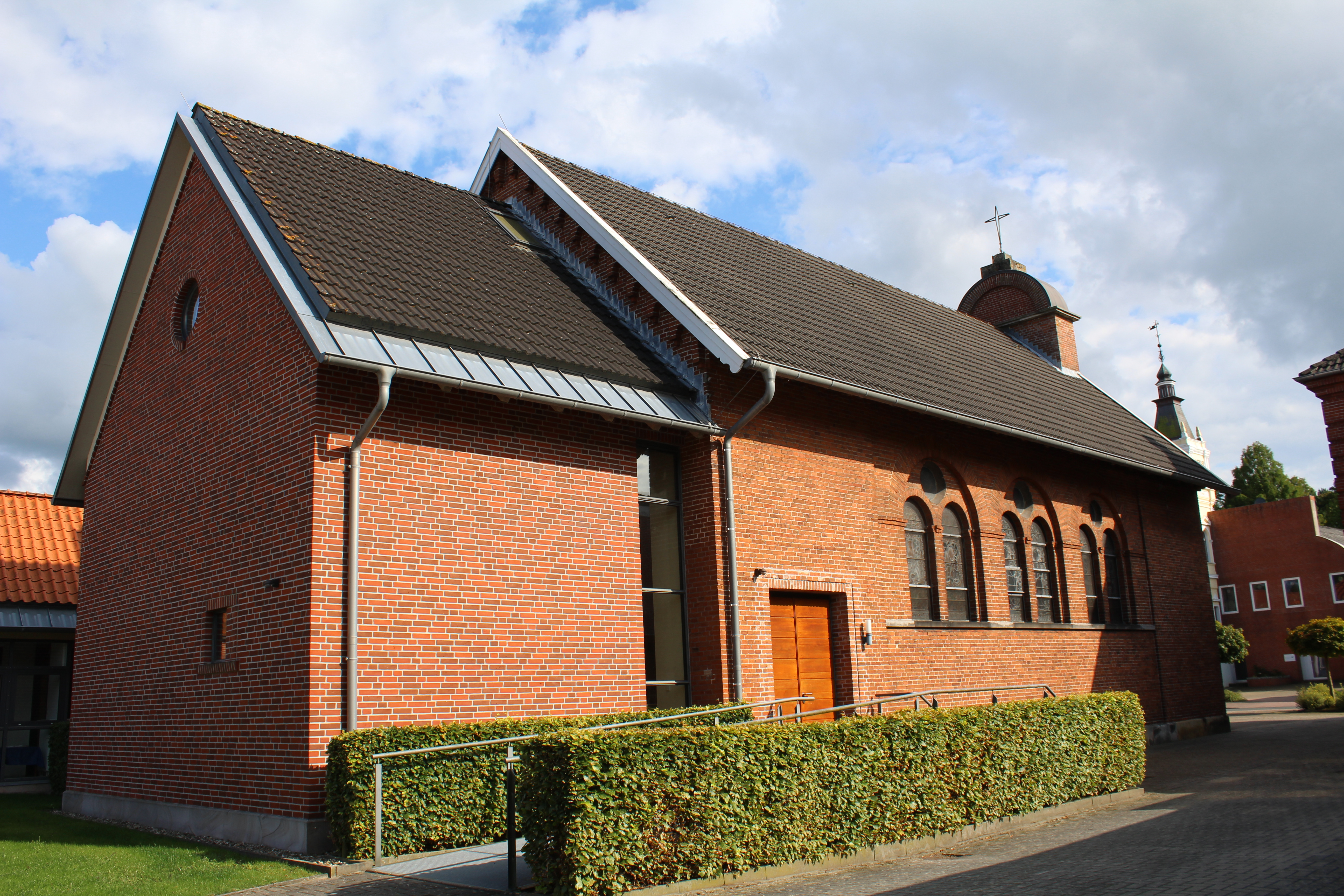 Katholische Kirche St. Joseph in Weener, Landkreis Leer, Ostfriesland, Deutschland